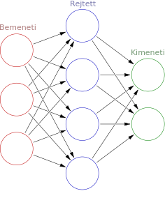 Magyarítása a linken elérhető képnek. Az eredeti szerző Glosser.ca